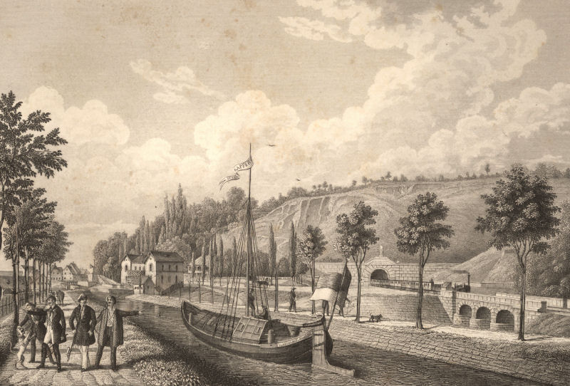 Der Kanal bei Erlangen gegen das Kanalmonument u. dem Ludwig-Süd-Nord-Eisenbahntunnel. Stahlstich von Alexander Marx aus dem Buch Pittoreske Ansichten des Ludwig-Donau-Main-Kanals. Gezeichnet, auf Stahl gestochen und herausgegeben von Alexander Marx. 1845. Kupferstecher in Nürnberg.